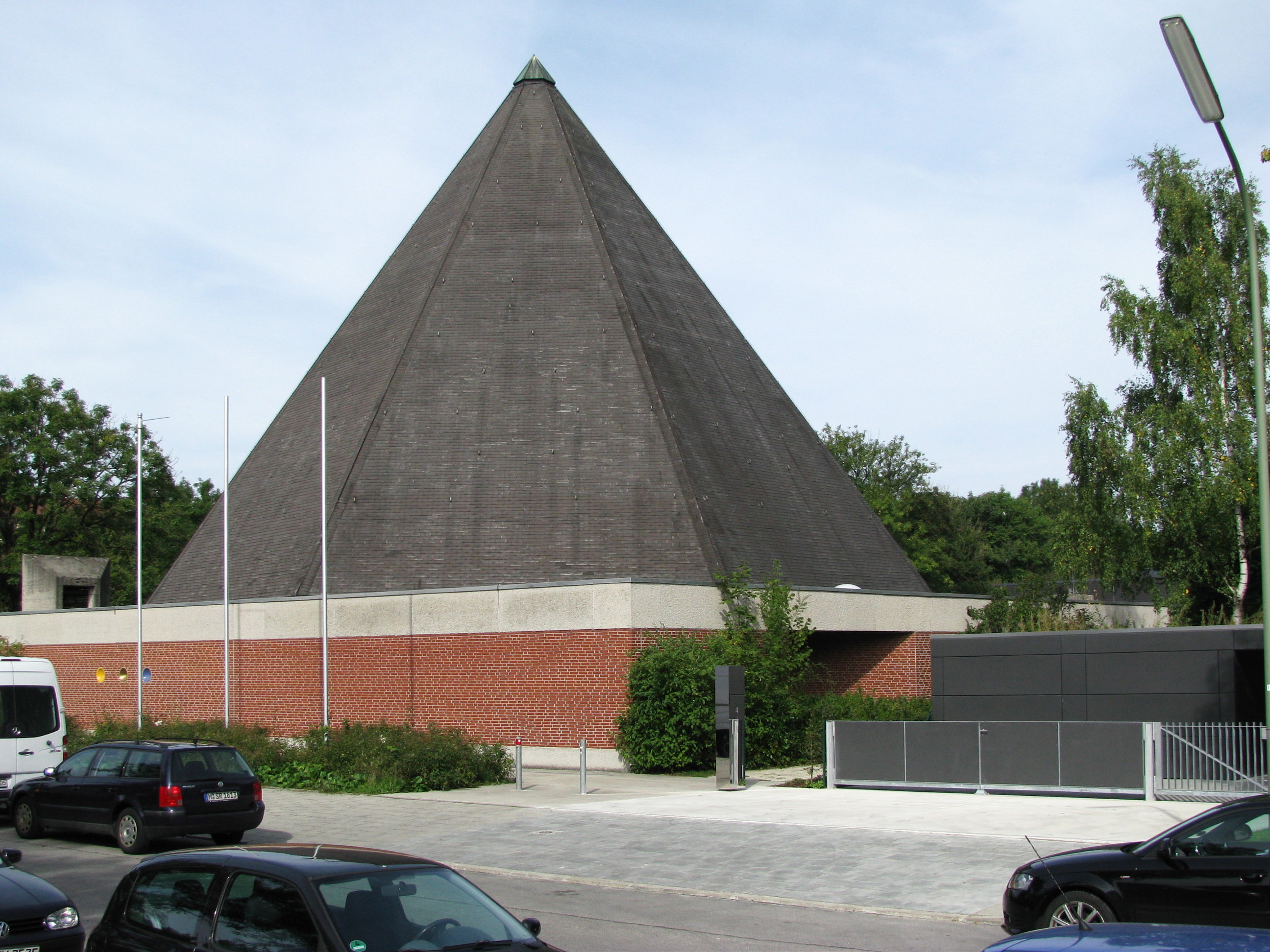 Kirche Mariä Sieben Schmerzen von Südosten